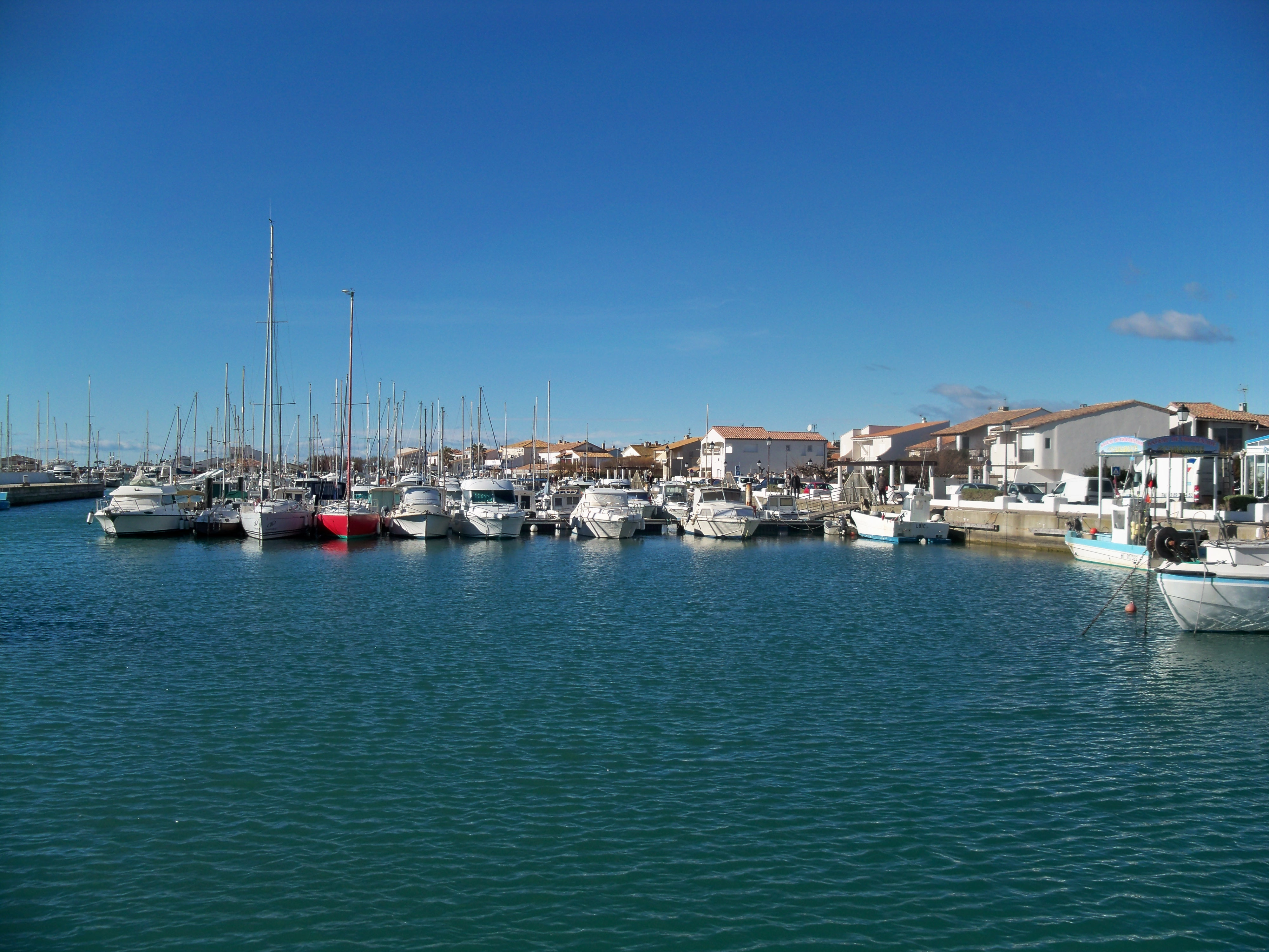 Port des Saintes-Maries-de-la-Mer